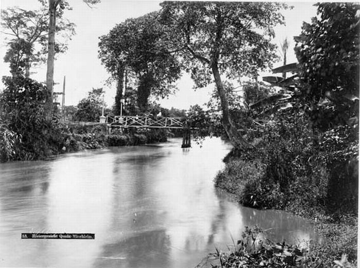 Foto. De Eiffelbrug over de rivier Kwala Mintjirim.